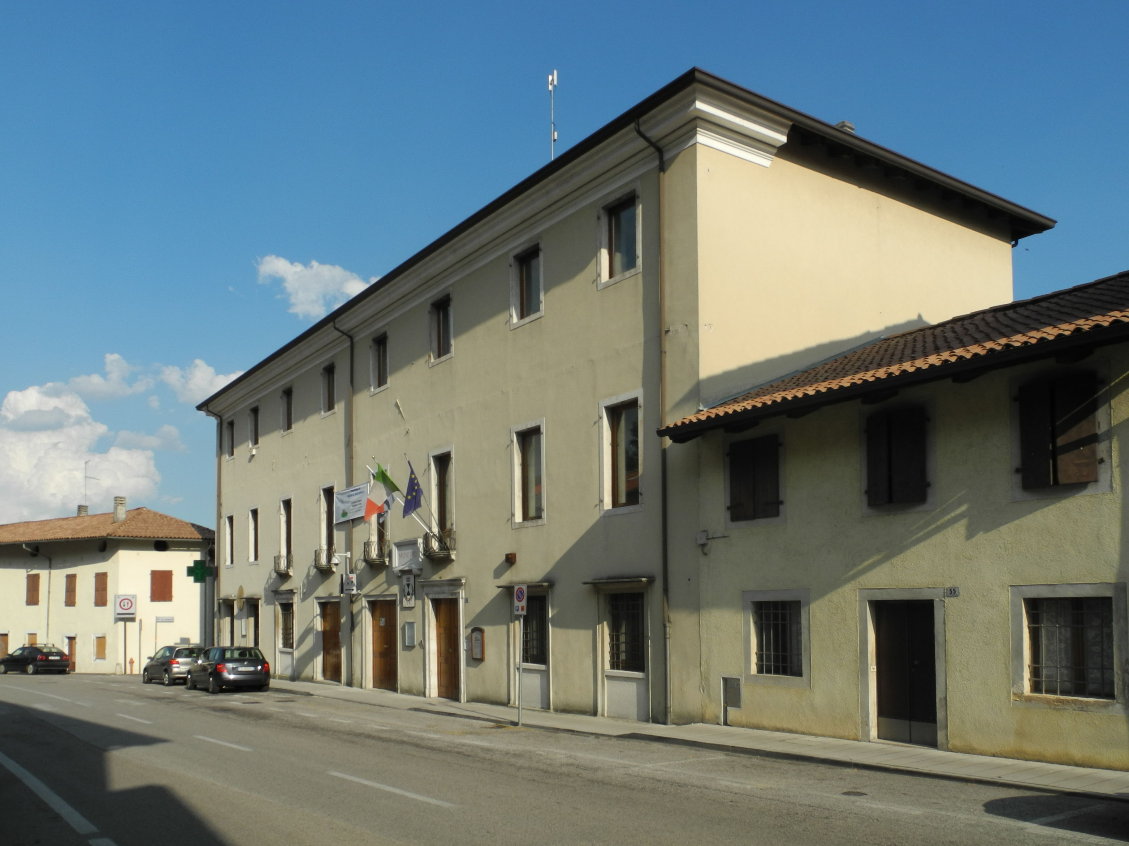 Palazzo Savorgnan-Rizzolati, Pinzano al Tagliamento PN Italia